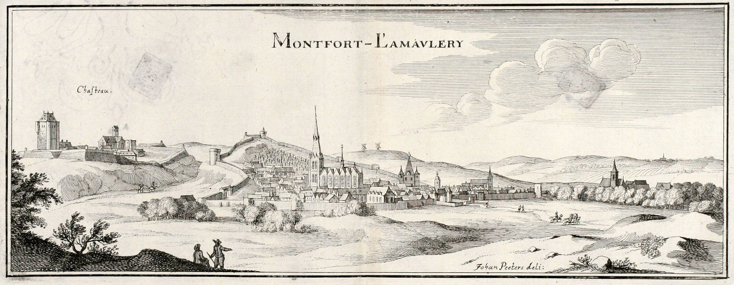 Kupferstich mit einer Ansicht der Stadt und Burg Montfort-l'Amaury in Frankreich aus der Topographia Galliae